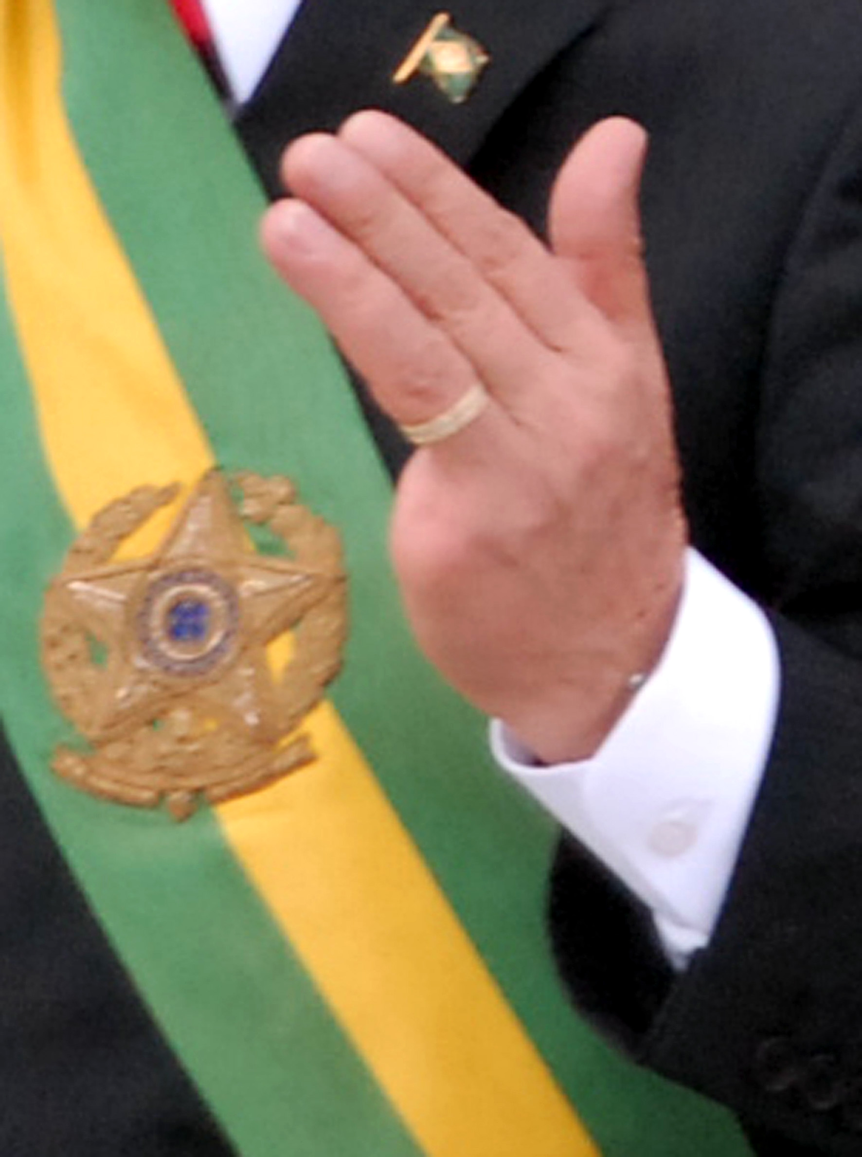 Fotografia em close da mão esquerda do presidente do Brasil Luiz Inácio Lula da Silva, com a ausência do dedo mínimo, perdido em acidente de trabalho.